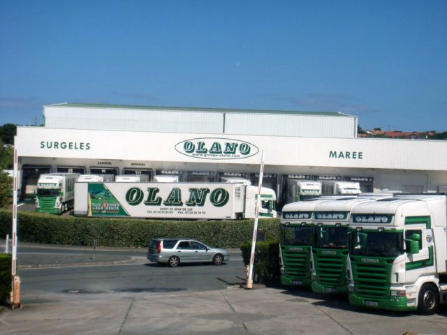 Une vue de l'agence Olano Saint Jean de Luz